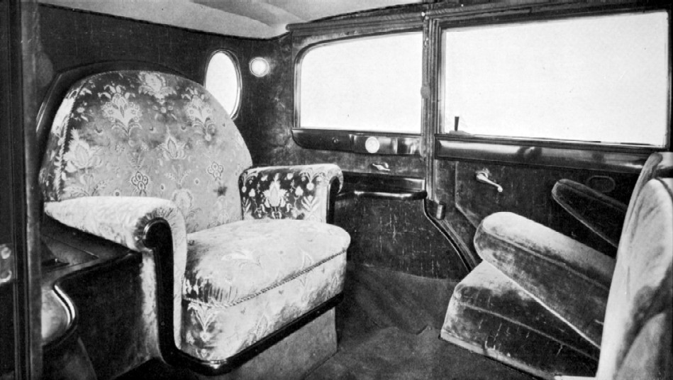 Bildbeschreibung: Mercedes-Benz Typ Nürburg 460 Quelle: Mediaseite der DaimlerChryslerAG Genehmigung: Gern können Sie für Ihre Tätigkeit für die Wikipedia Inhalte der DaimlerChrysler Medienseiten verwenden. Dazu erkennen wir die Bedingungen nach GNU-FDL an. Das Angebot bezieht sich auch auf die vorhandenen Bilder.(Dr.Josef Ernst, Communications, DaimlerChrysler AG)